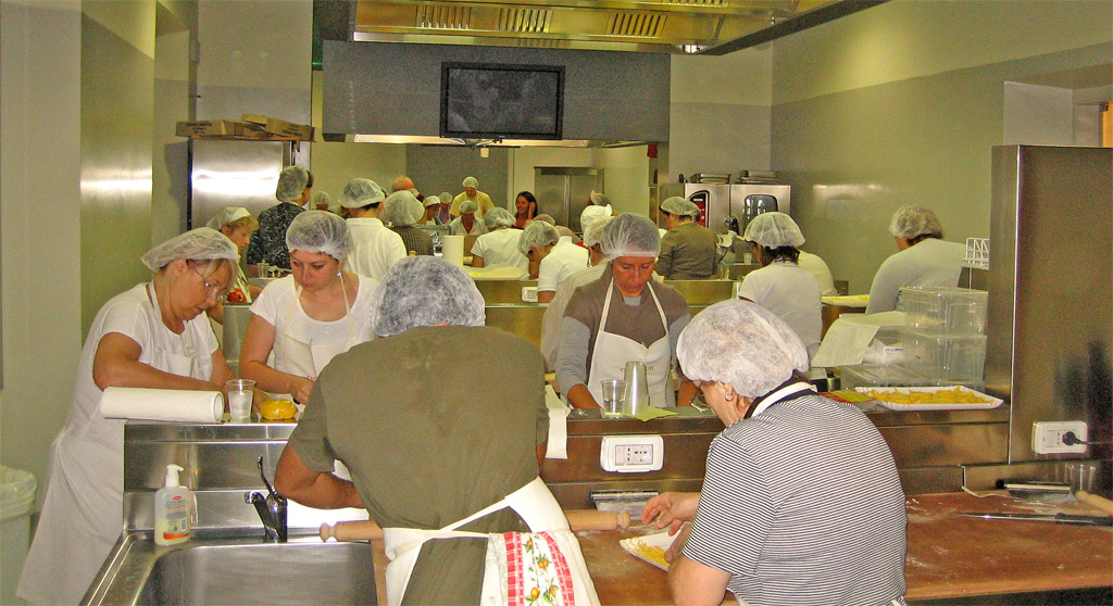 Corso di cucina nella Casa Artusi Forlimpopoli - Italia.